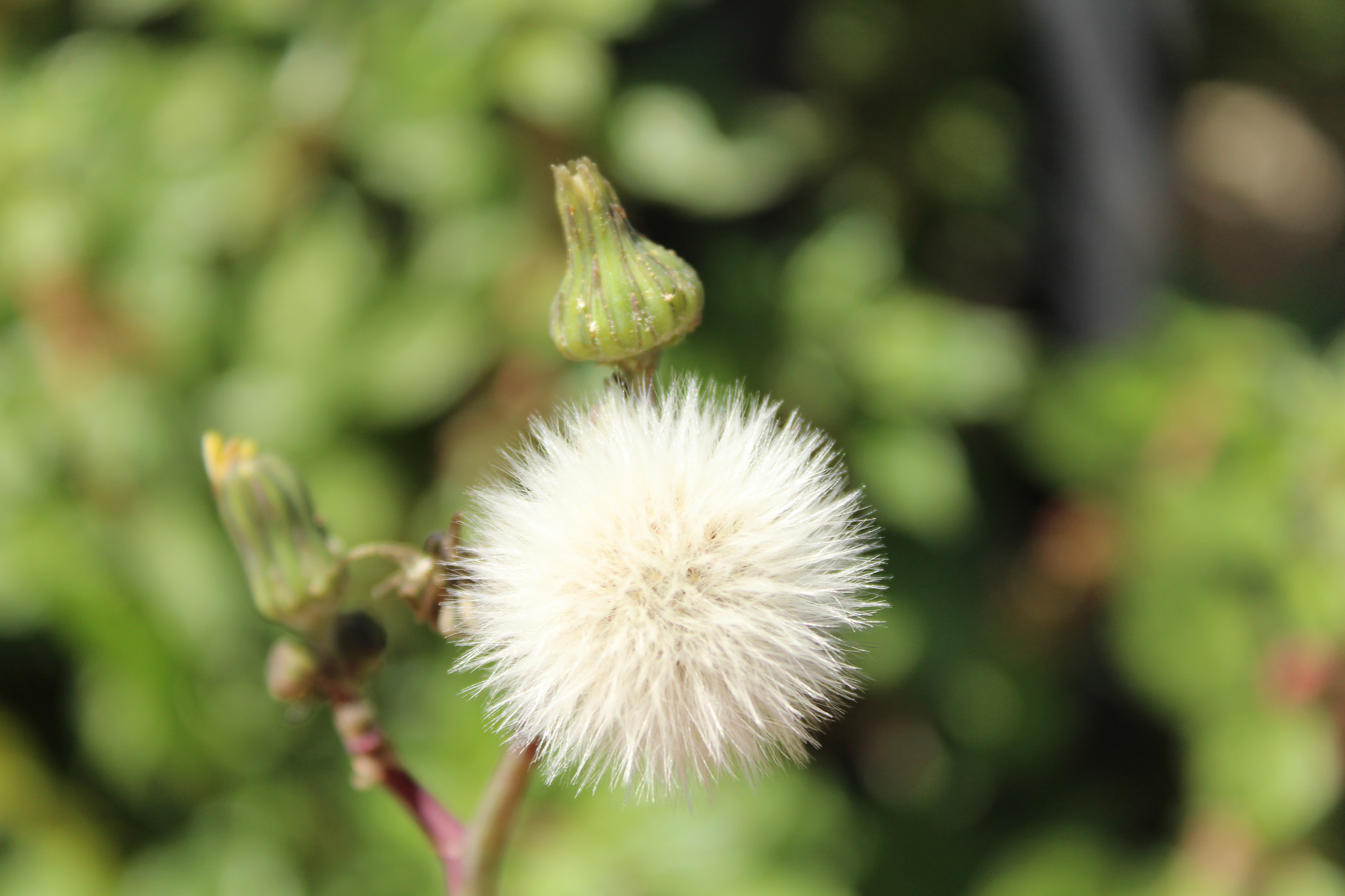 צמח סביון